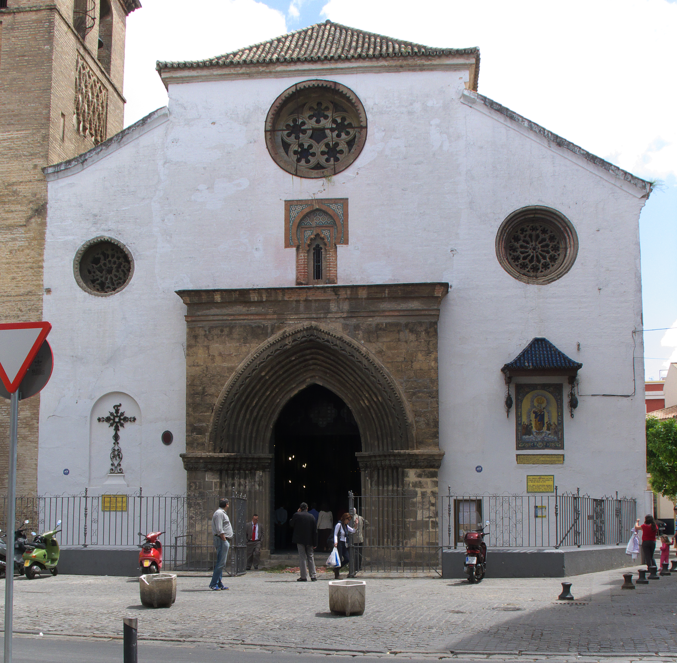 Fachada principal, correspondiente a los pies de la iglesia con el azulejo de la reina de todos los santos. Exponente de la primera arquitectura gótico-mudéjar de la ciudad, promovida por el rey Fernando III de Castilla.